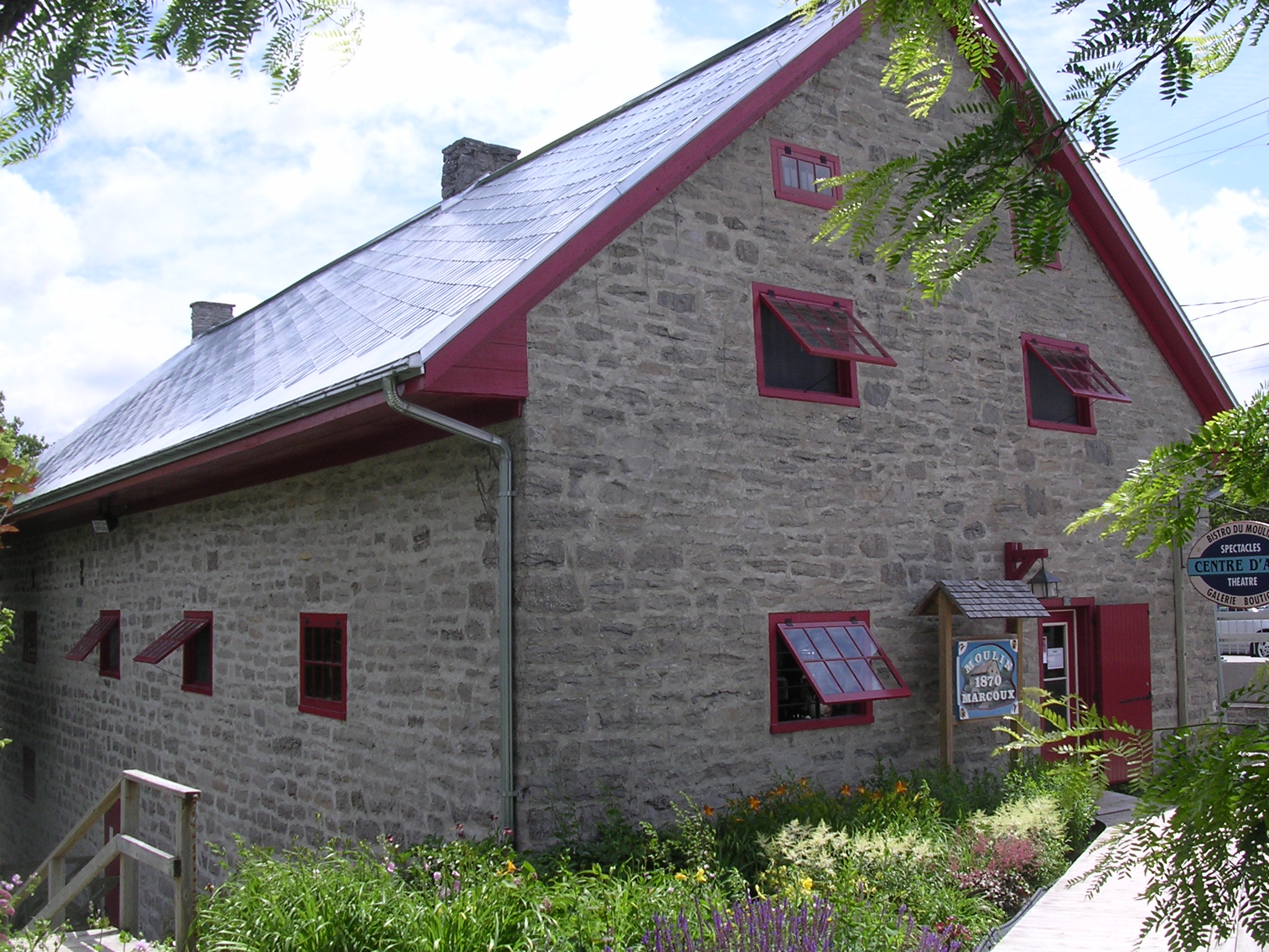 Moulin Marcoux, situé à Pont-Rouge (région de la Capitale-Nationale, Québec). Il n'a plus ses mécanismes, il est maintenant utilisé comme centre culturel. Moulin à eau; moulin à farine; salle de spectacles; salles d'exposition; café-bistro.